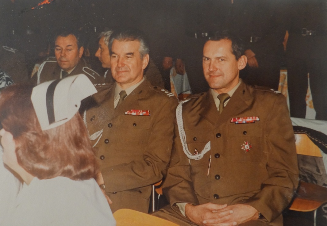 Kadra 45 Batalionu Medycznego podczas uroczystości